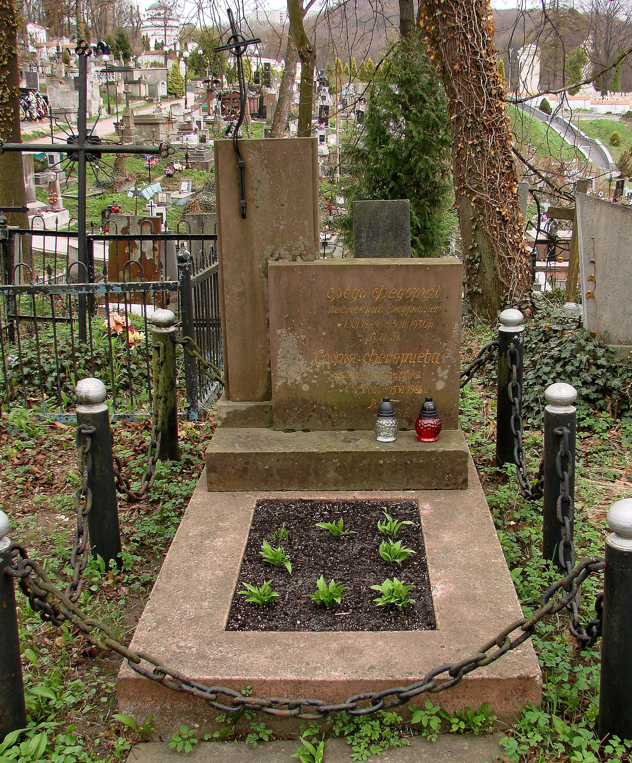 Поховання Ф.та С.Федорцевих.